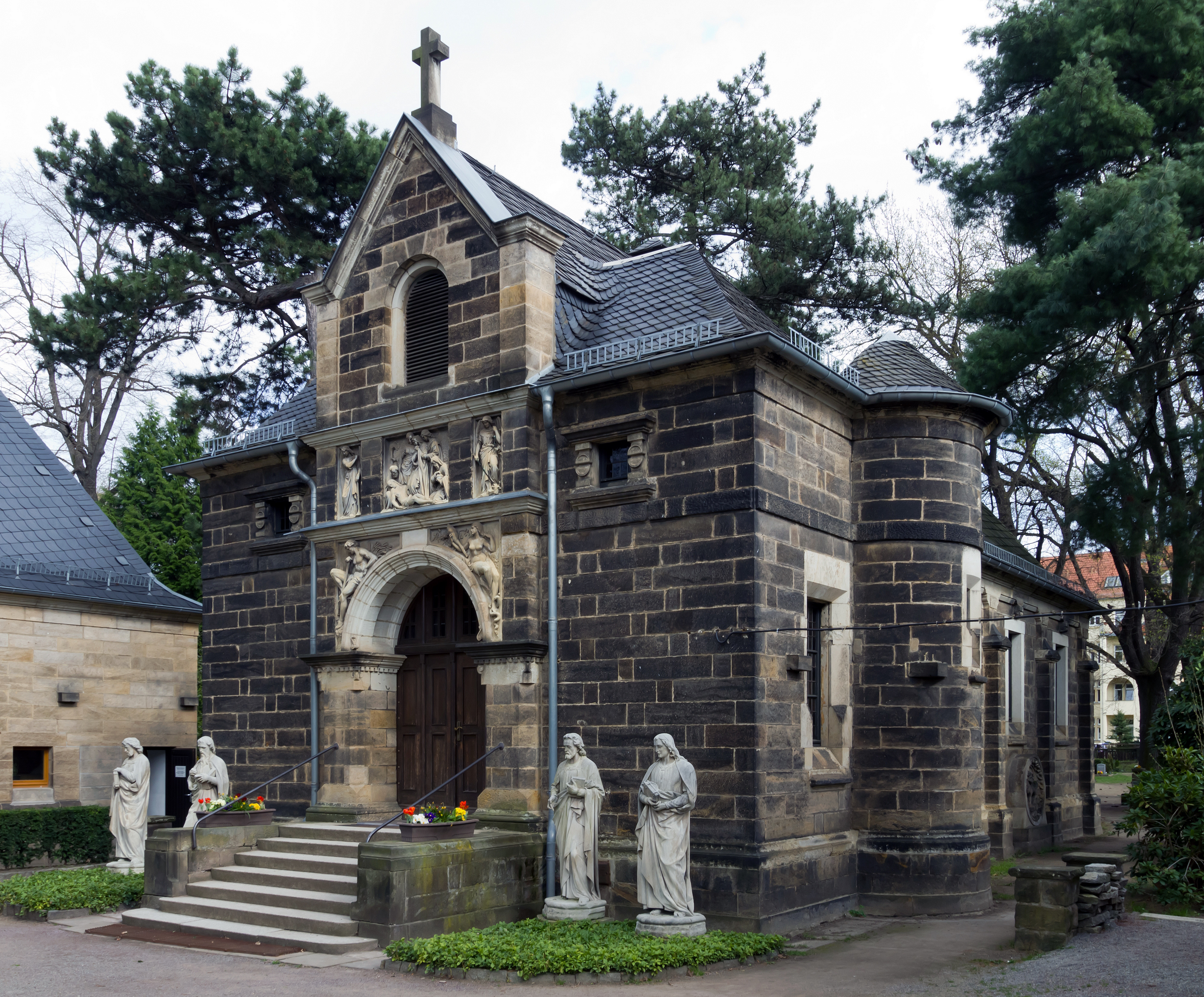 Friedhof Striesen